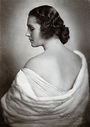 Nora Gregor